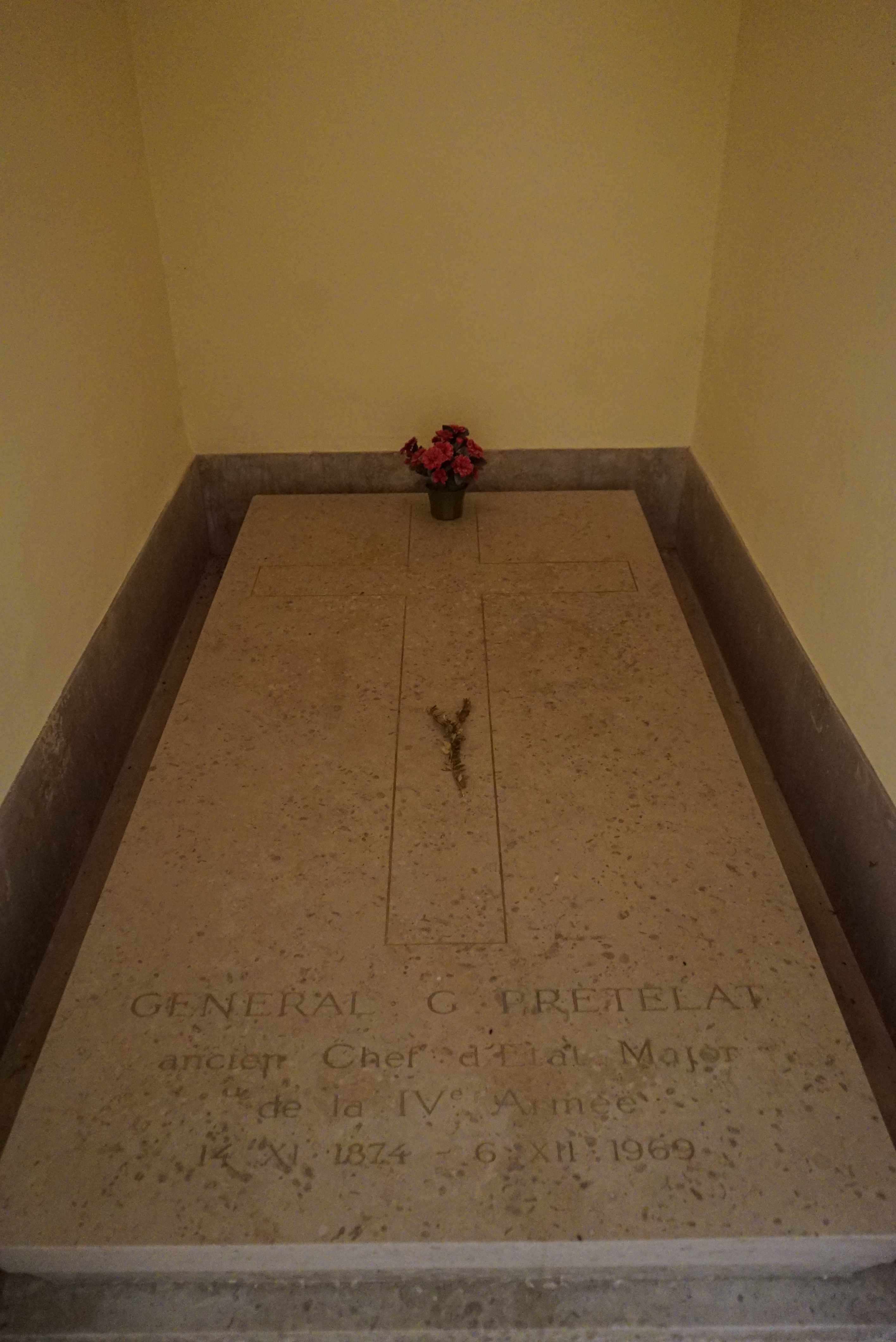 intérieur de l'ossuaire de Navarin.